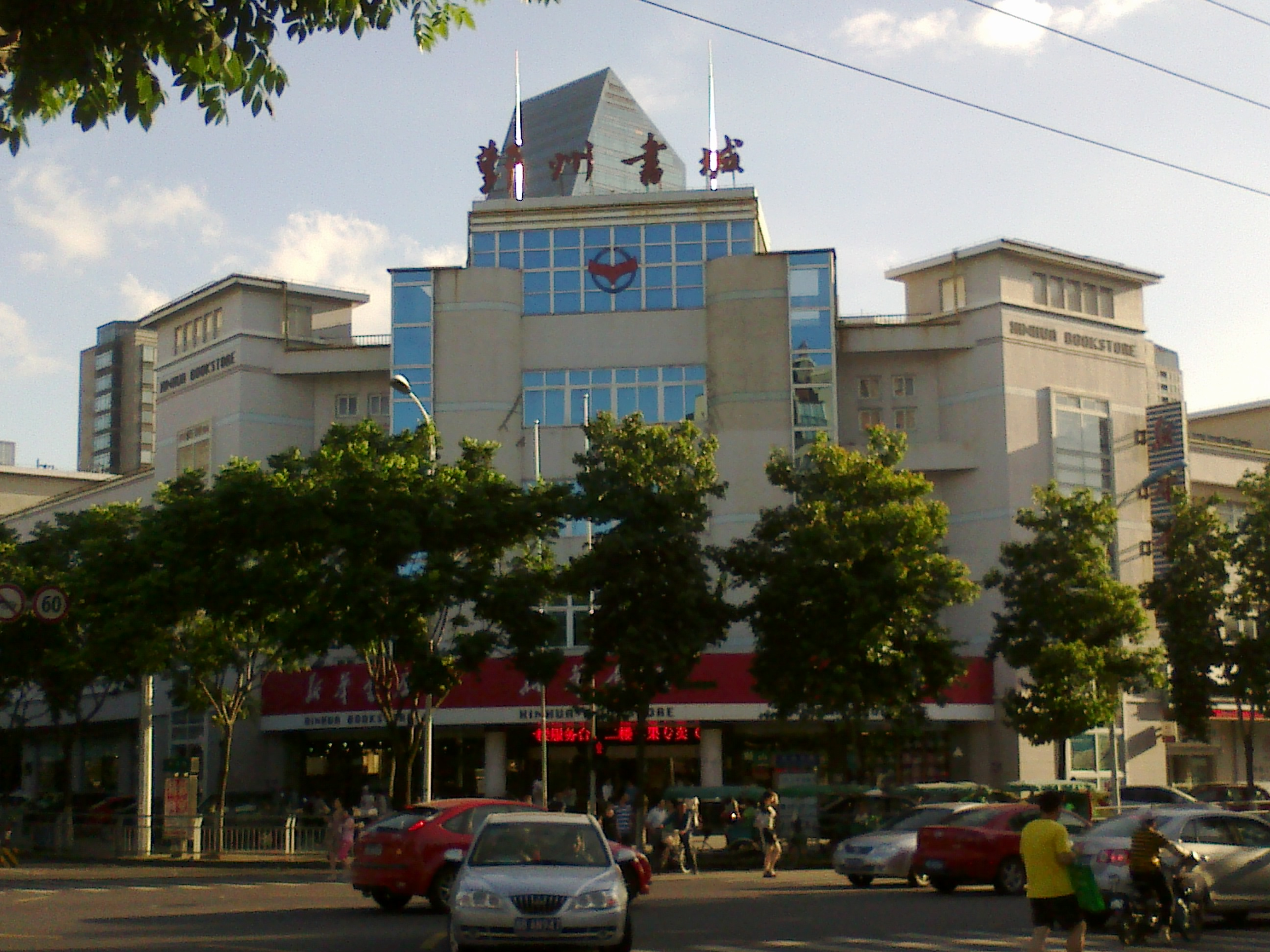 鄞州书城全景